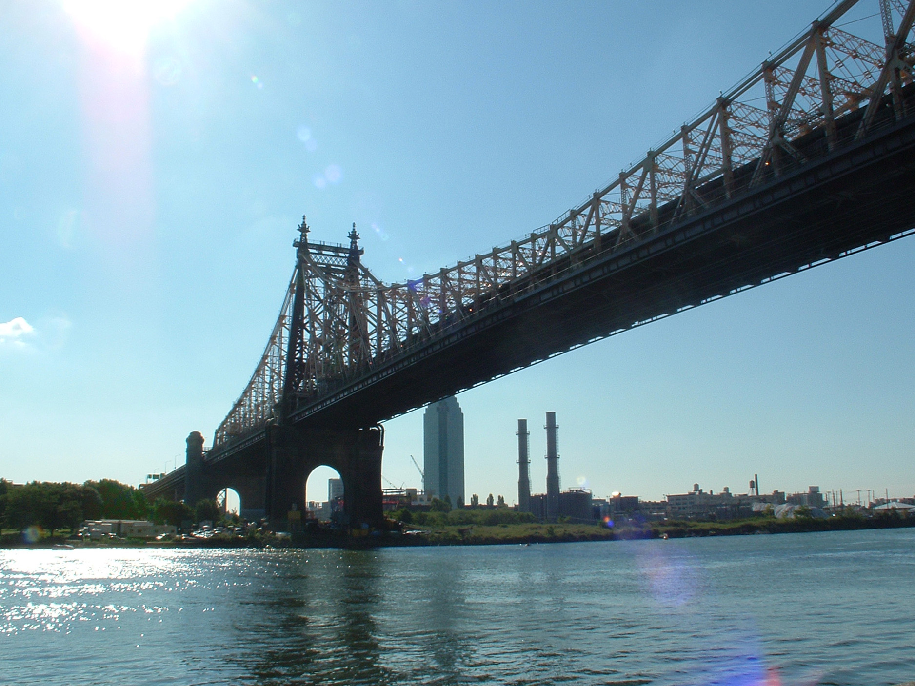 Queensboro Bridge gezien vanaf Roosevelt Island richting Queens